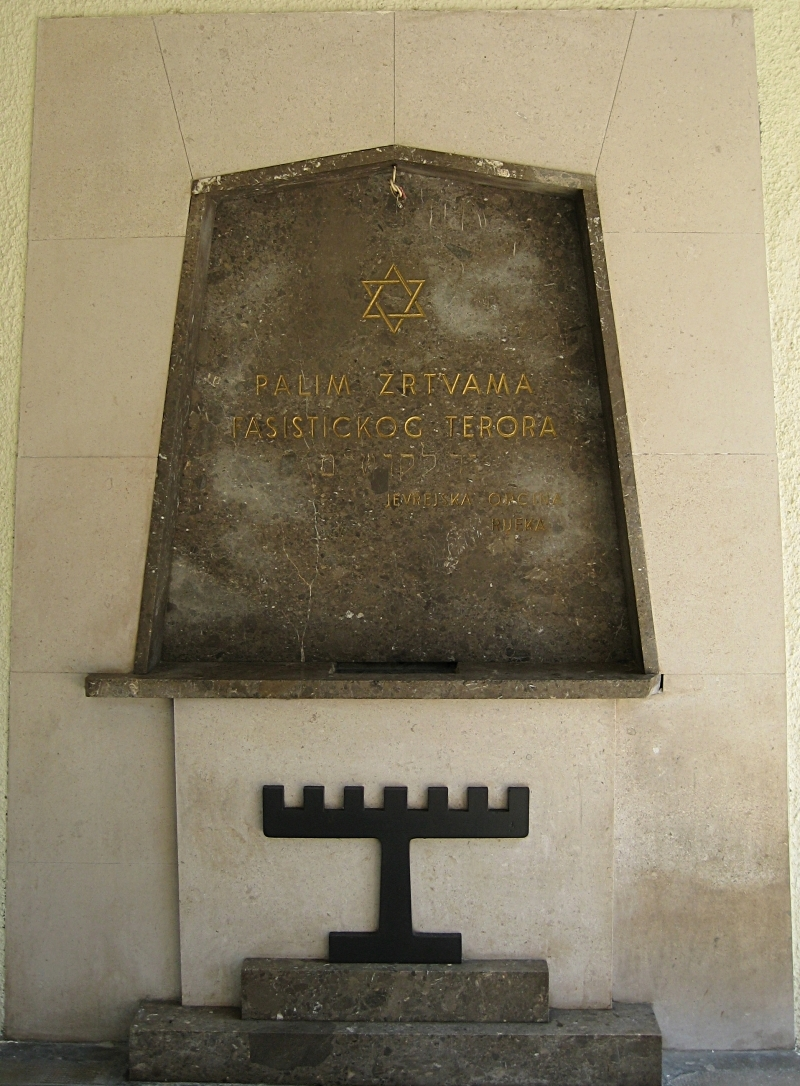 Spomen ploča na ulazu u riječku sinagogu